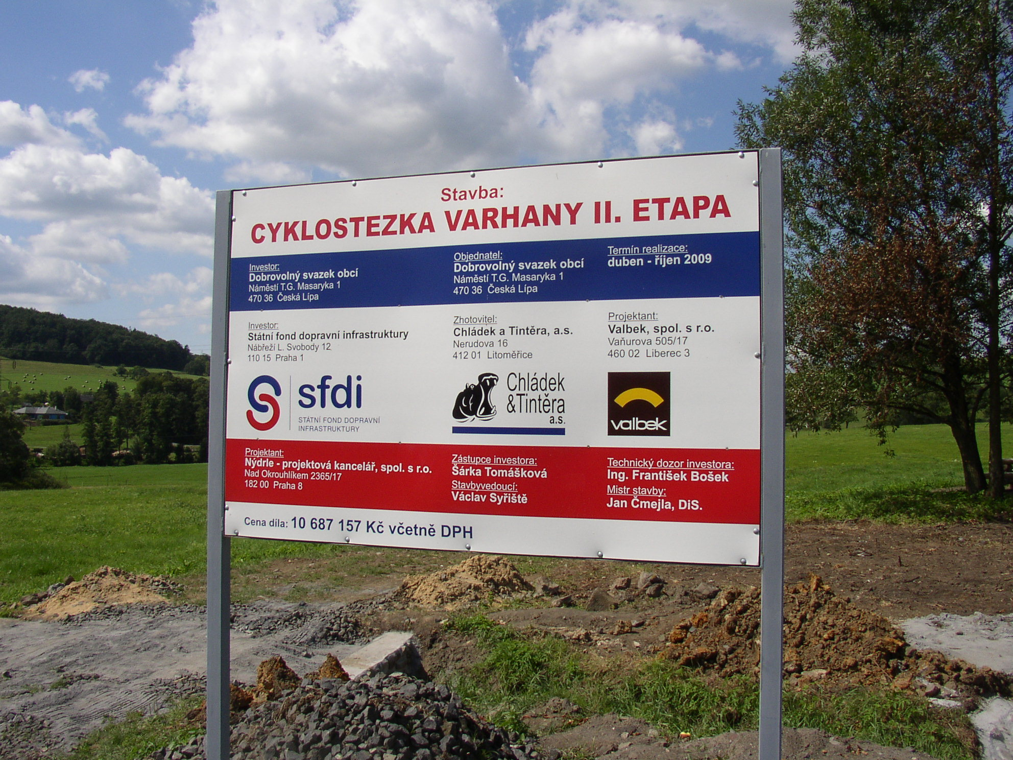 Informační cedule o výstavbě cyklostezky Varhany v Horní Libchavě